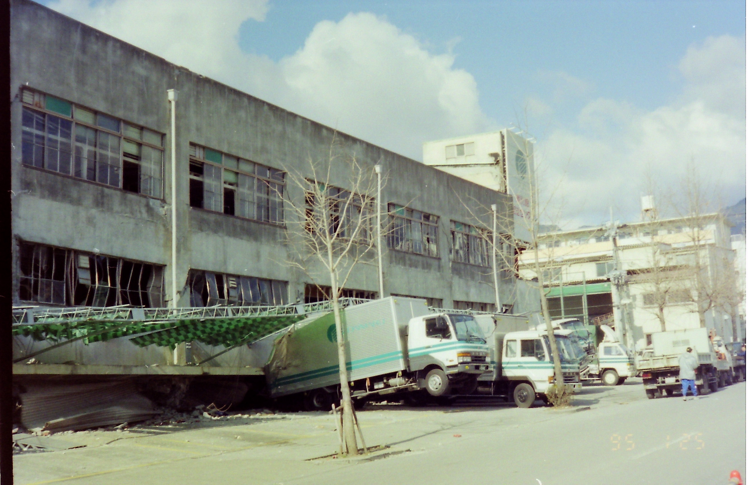 神戸市灘区内にあった大丸百貨店の神戸配送センターが、1月17日の大地震により一階部分が完全に押し潰された様子。 この崩壊で、配送積み込みのために駐車中のトラックの後部を、一階部分の張り出した屋根のひさし部分が直撃し、まるで地対空ミサイルの発射台の様に跳ね上がった様子。